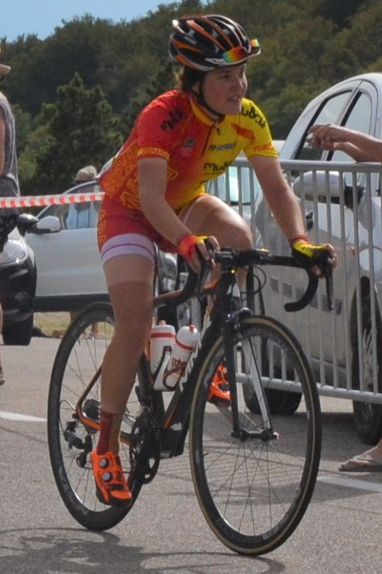 Cristina Martínez Bonafé: ciclista valenciana